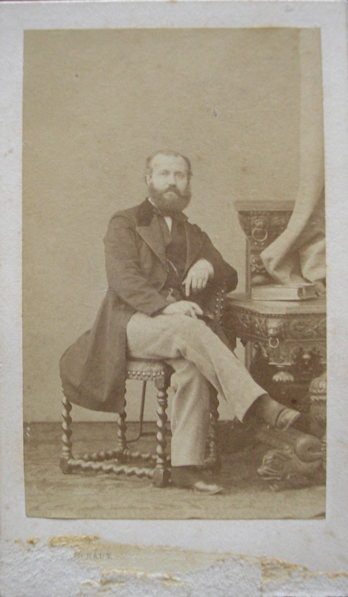 Photo de Gounod jointe à la partition de Mireille, version 1864, dédicacée à Ismaël, recto